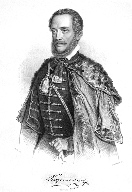 Kossuth, Lajos von (1802 - 1894) porträt